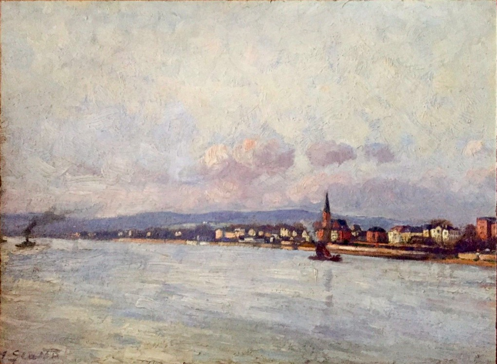 Adolf Glatte (1866-1920): Blick auf den Rhein bei Biebrich, um 1900, Öl auf Karton, 44 x 59 cm, Privatsammlung Wiesbaden.